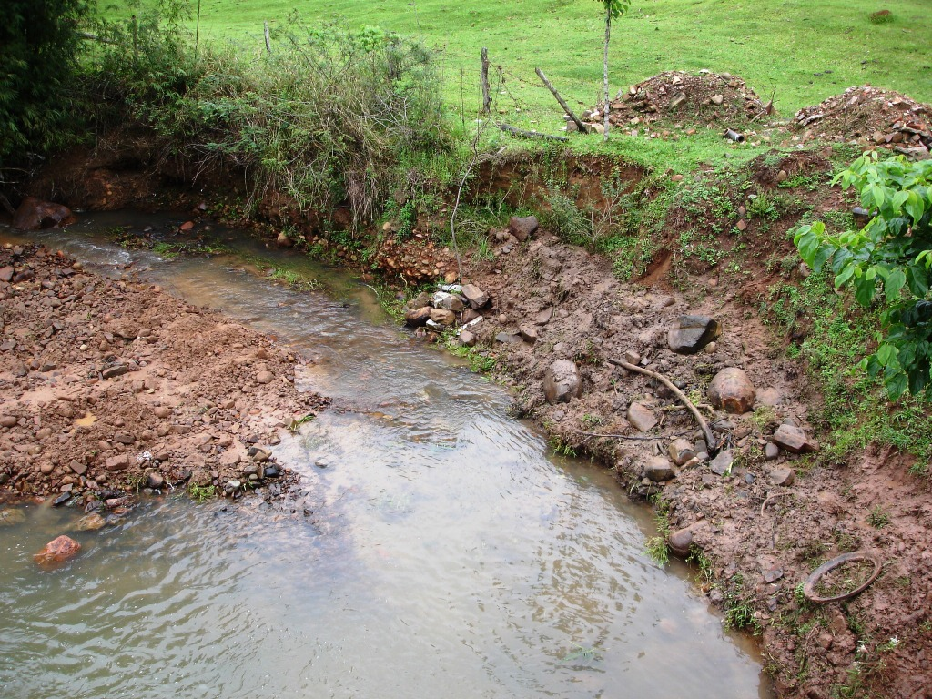 Talude fluvial antes de estabilização biotécnica (Vale Vêneto-RS / Brasil)